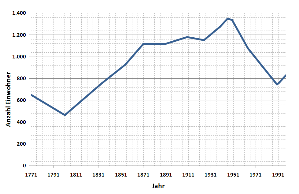 Einwohnerentwicklung des Gornauer Ortsteils Witzschdorf